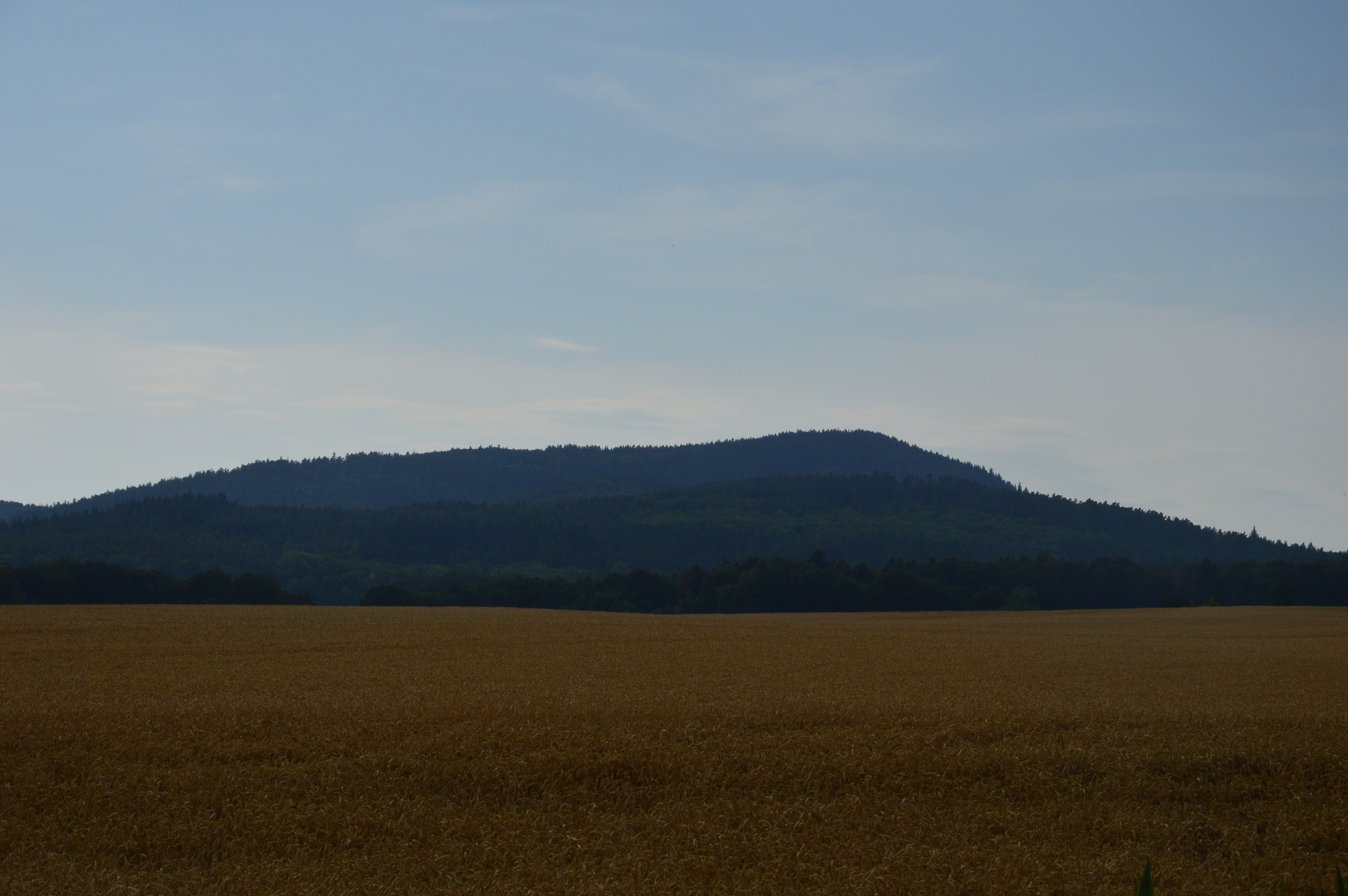 Widok z drogi między miejscowościami Sulistrowice i Oleszna